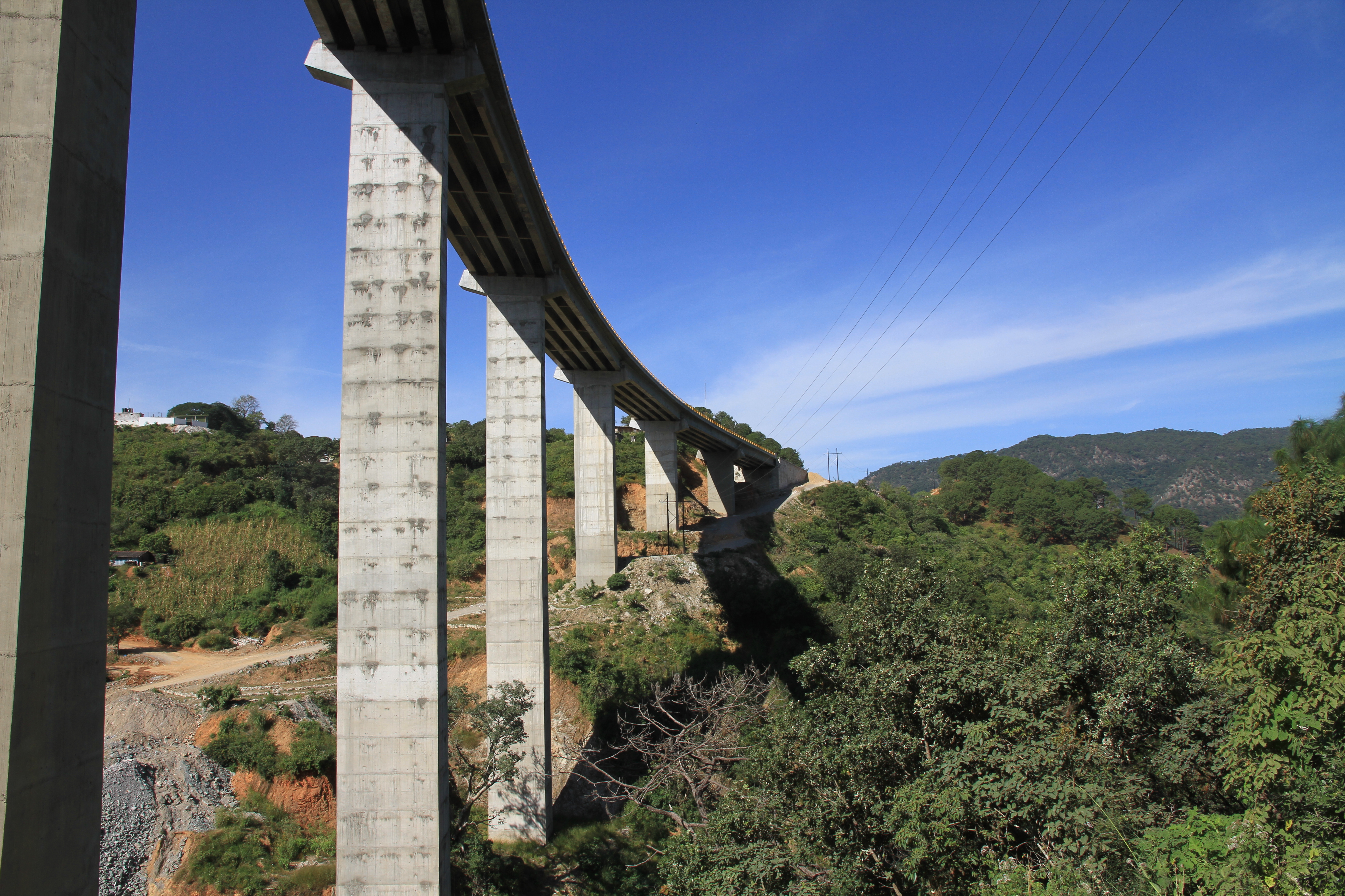 Puente Santa Lucía, Mexico.